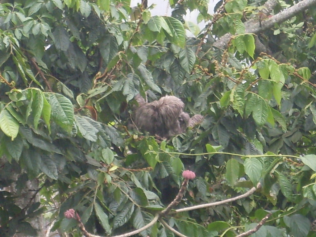 Bradypus tridactylus, La Boyera - Municipio El Hatillo, Estado Miranda - Venezuela